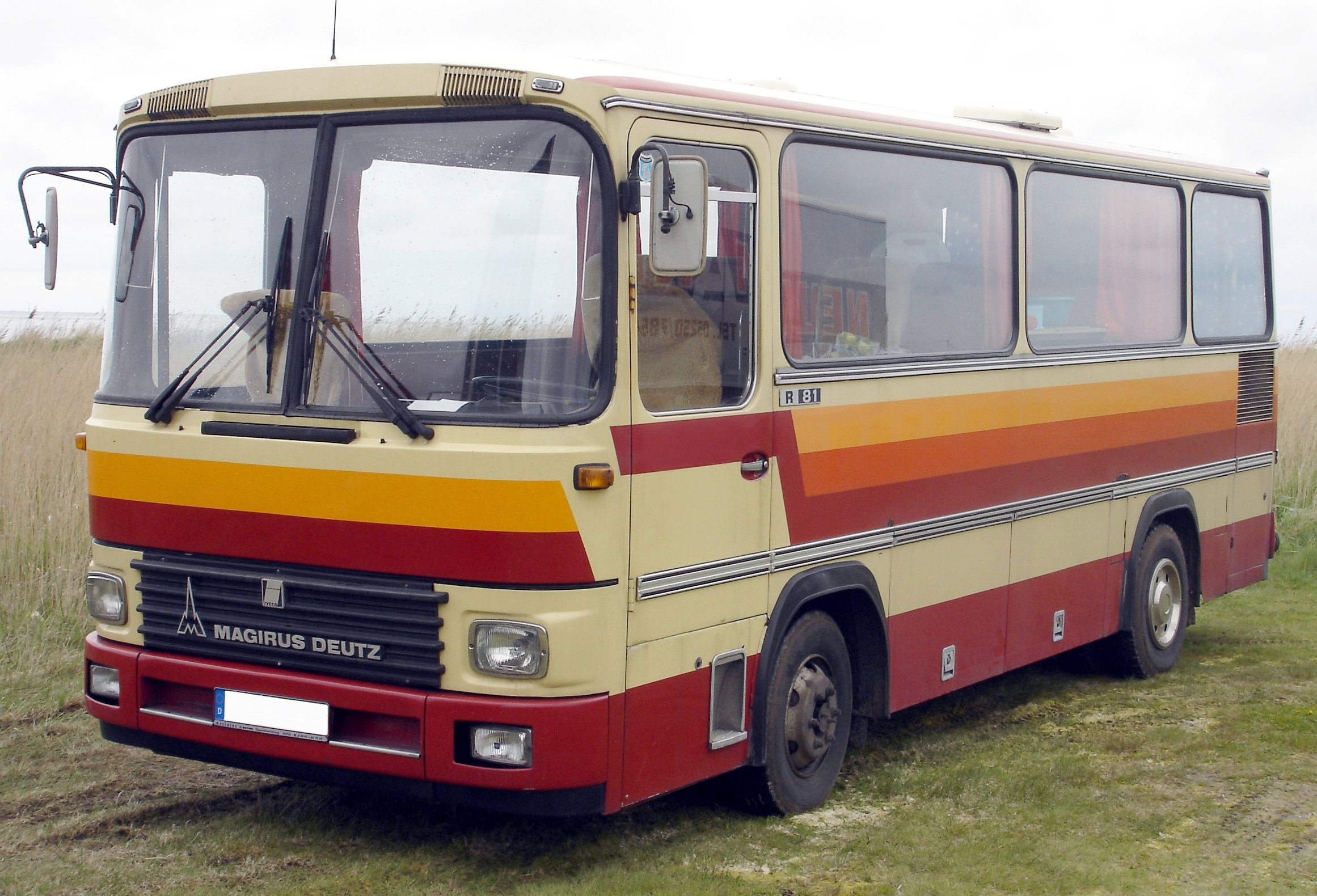 Magirus-Deutz R81 Kurz-Reisebus